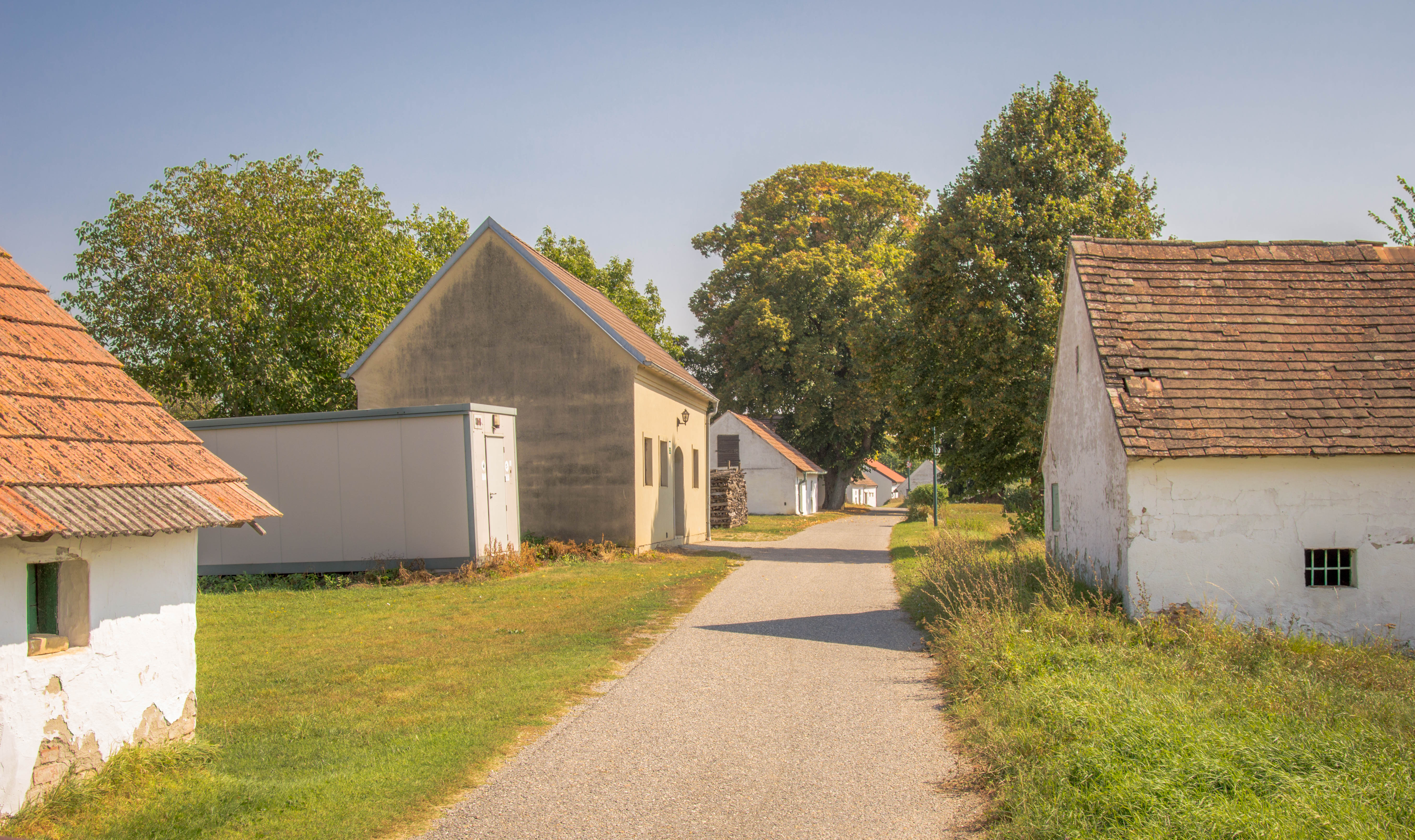 Kellergasse Am Gwend (bei der Kirche) in der KG Spannberg in Spannberg